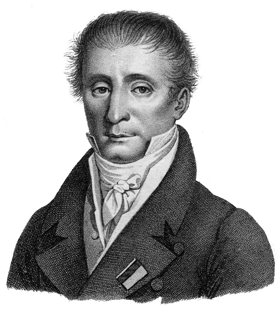 Portrait Francois-Victor Bally